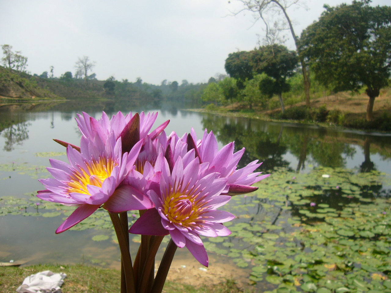 Madhobpur Lake Srimongol Sylhet Bangladesh